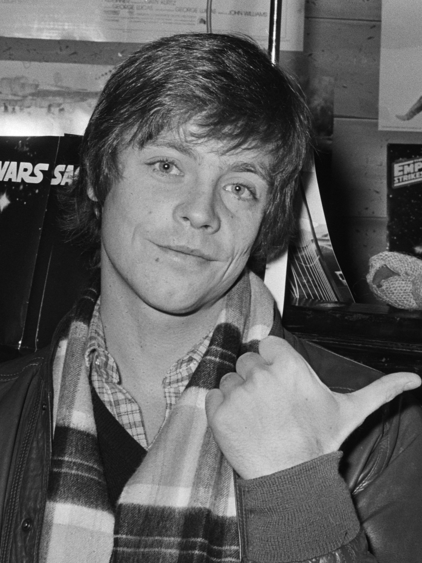 De Amerikaanse akteur Mark Hamill, die de rol speelt van Luke Skywalker in de film "The Empire strikes back", gaf een persconferentie 18 december 1980